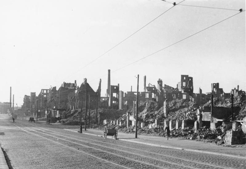 Hamburg: Ruinen im Arbeiterviertel der Stadt. Zentralbild/XIII